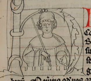 vévoda Jindřich XIII. Bavorský